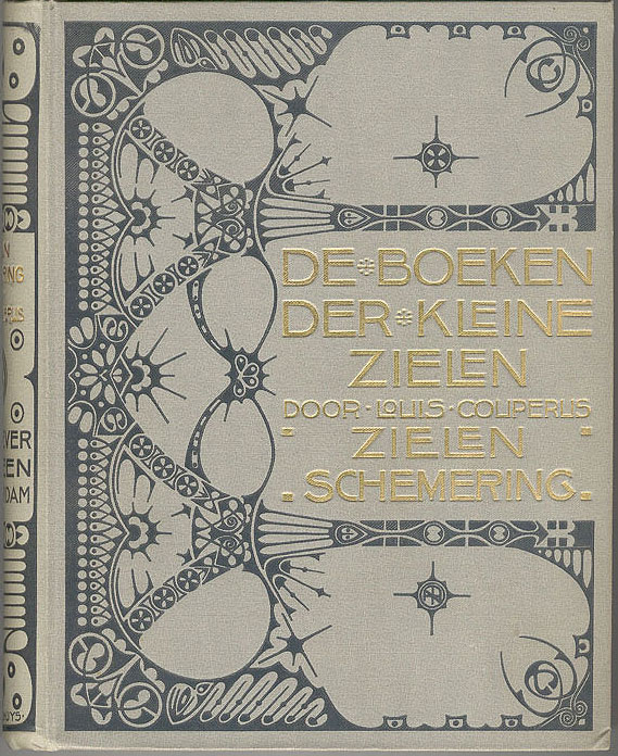 De boeken der kleine zielen. De kleine zielen, gescande boekband ontworpen door T.J.J. Neuhuys (1878-1921)